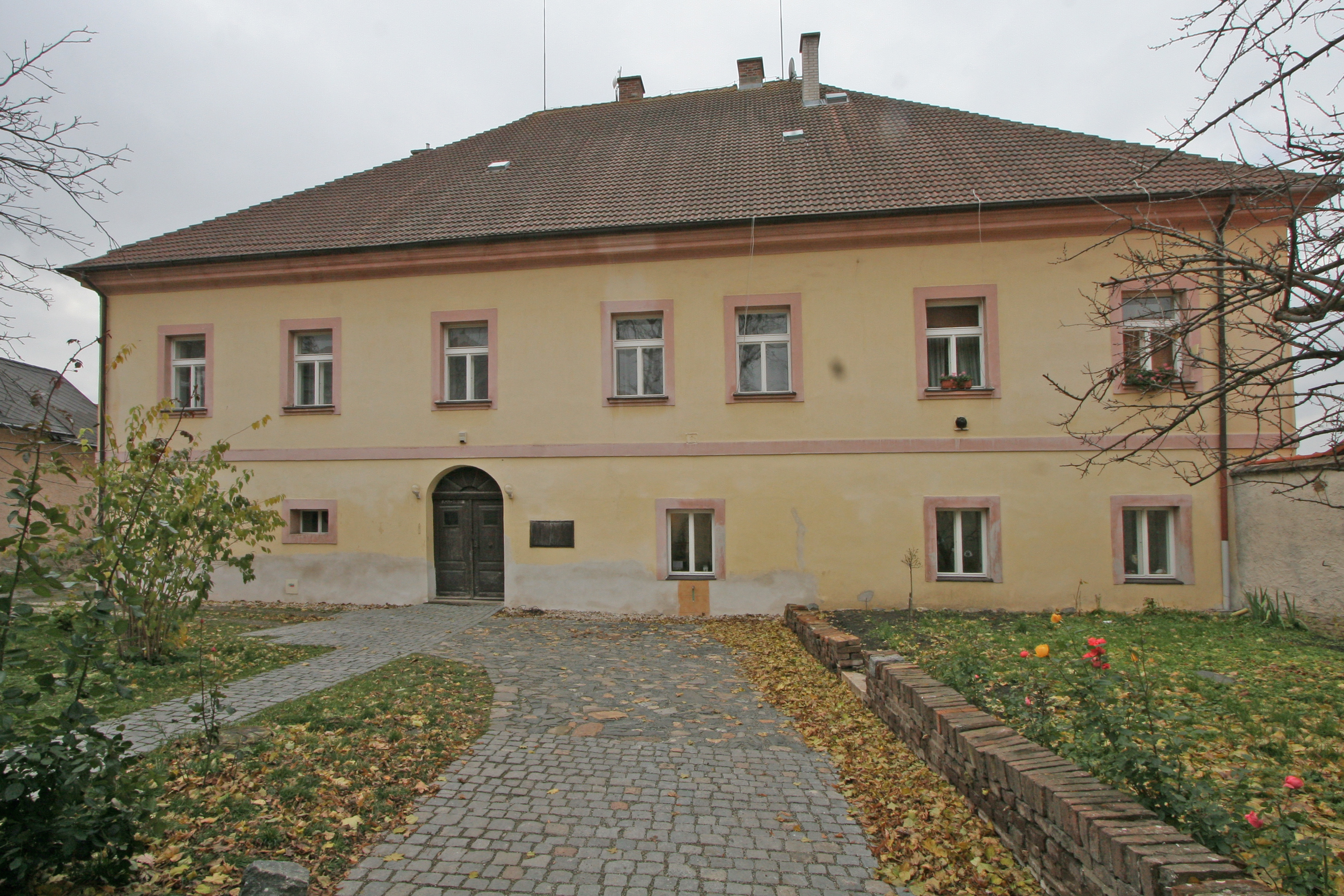 Děkanství (Čáslav), Kostelní nám. 186/2, Čáslav